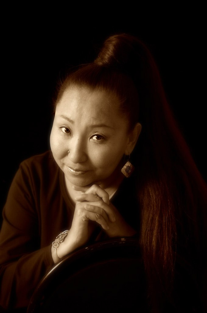 Софья Кара-оол-Дулуш - народная артистка Республики Тыва.